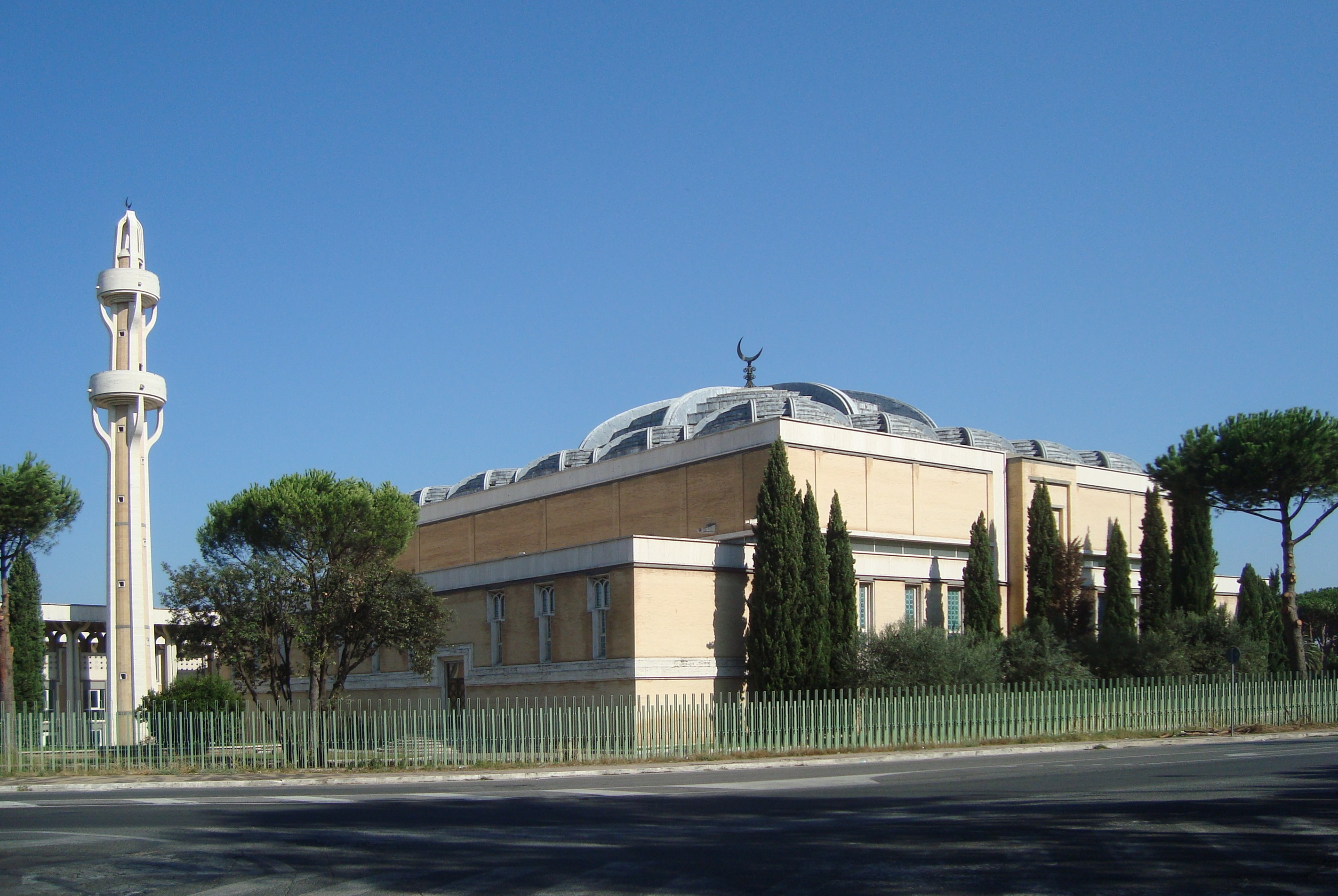 Vue d'ensemble de la grande mosquée de Rome dans le rione de Parioli.